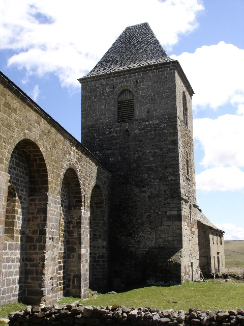 Vue de l'ancienne Domerie, Saint-Chély-d'Aubrac , Aveyron, France